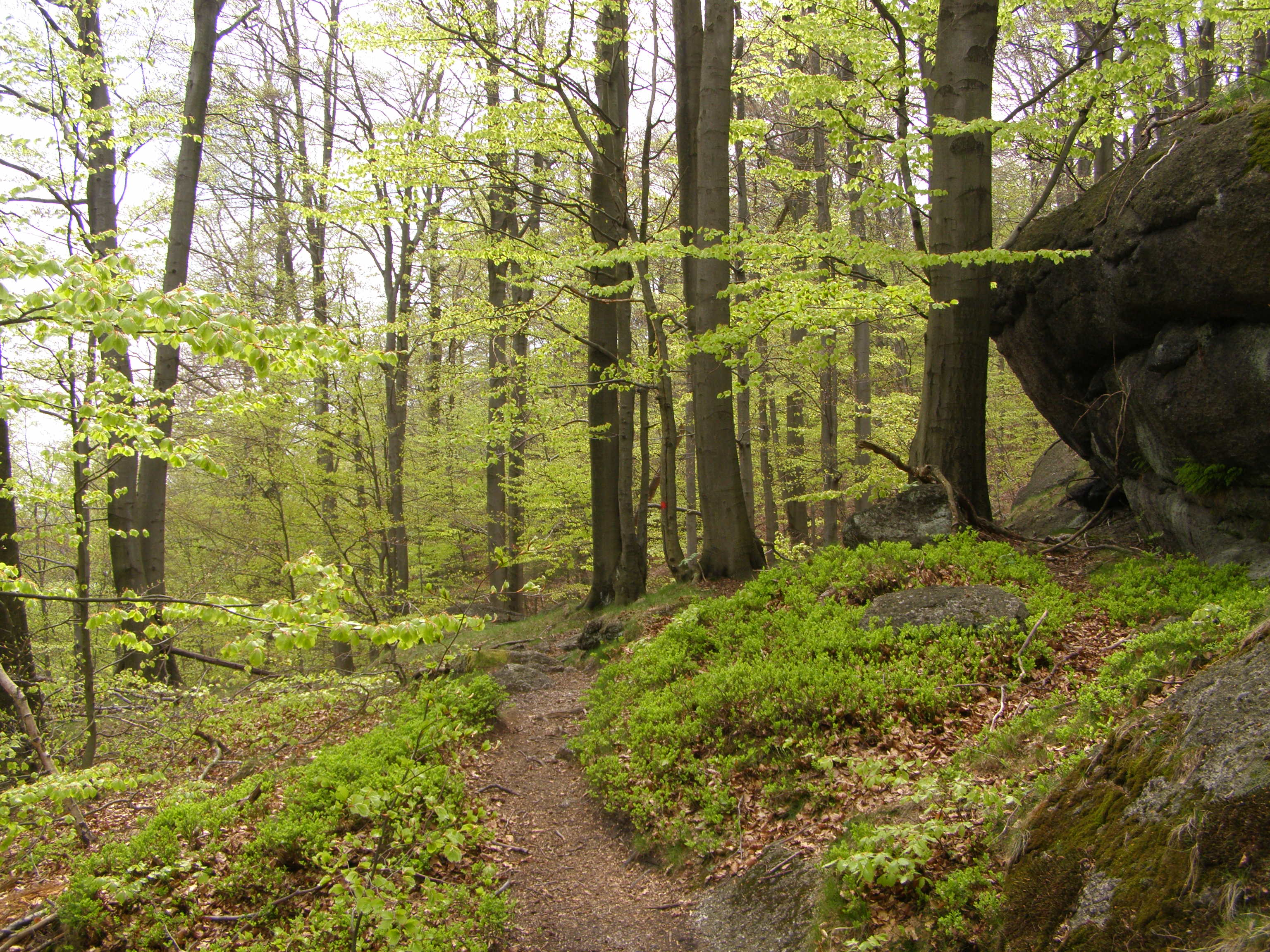 Česky: Oldřichovská vrchovina, NPR Jizerskohorské bučiny, stezka na severovýchodním úbočí vrcholu Špičák (724 m)